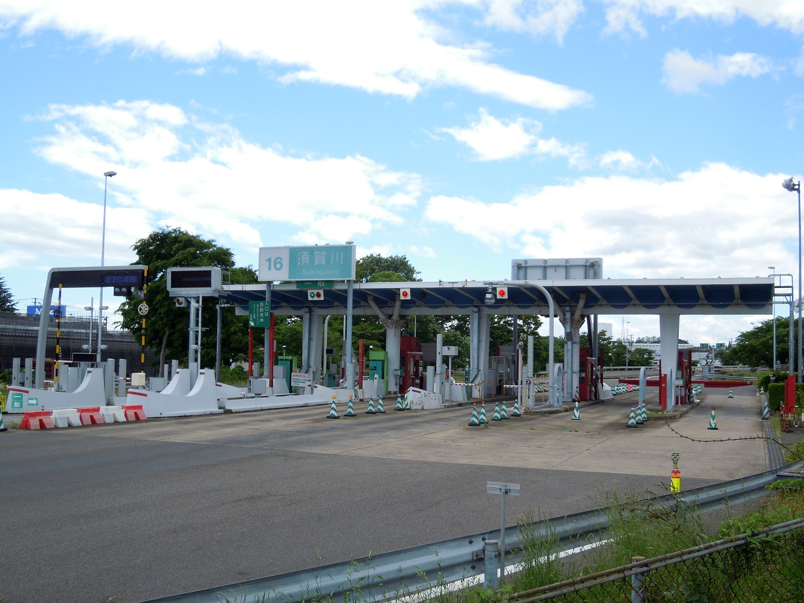 福島県須賀川市にある東北自動車道須賀川インターチェンジの料金所